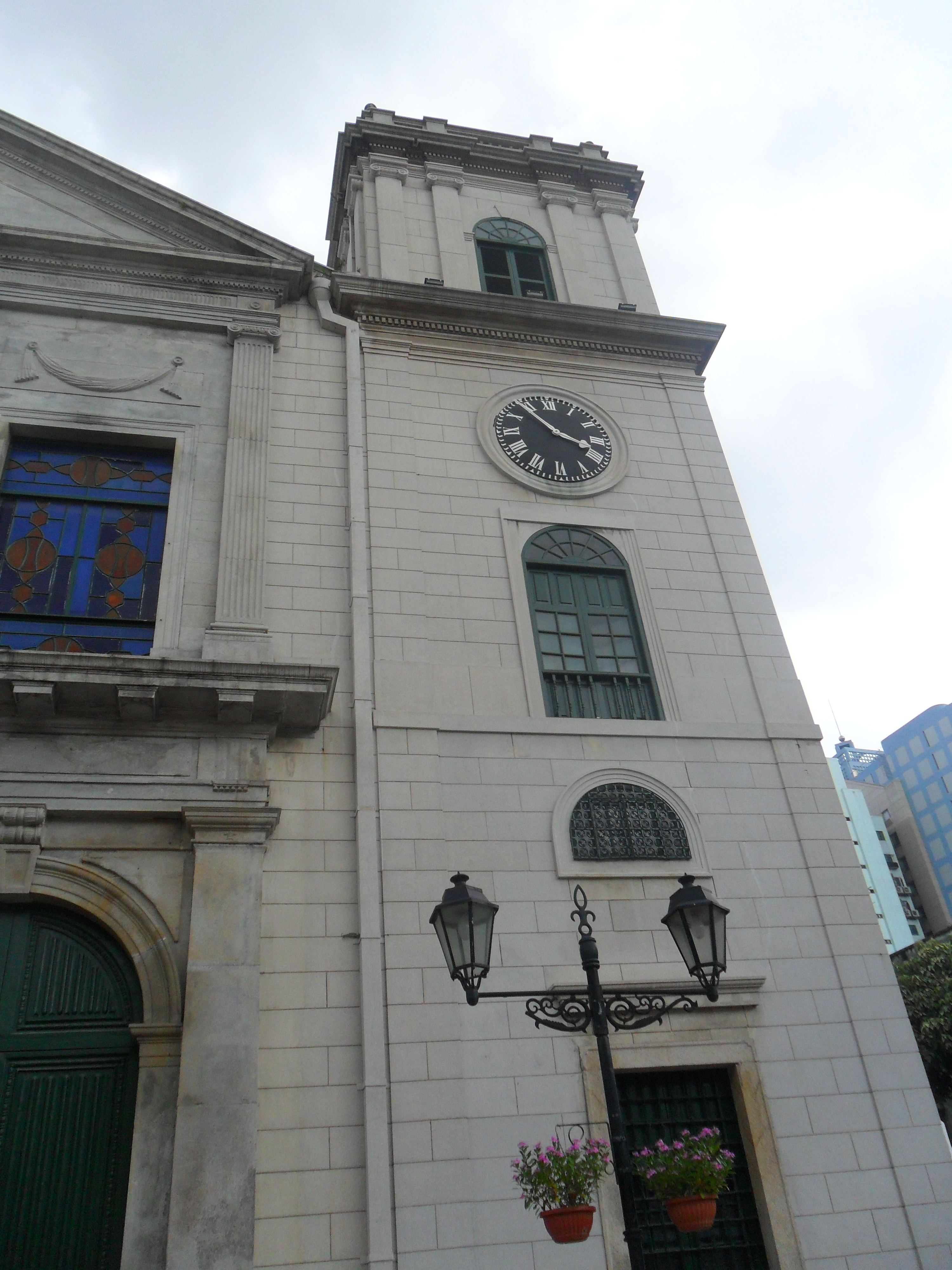 中文(香港): 聖母玫瑰堂, 香港, 中國